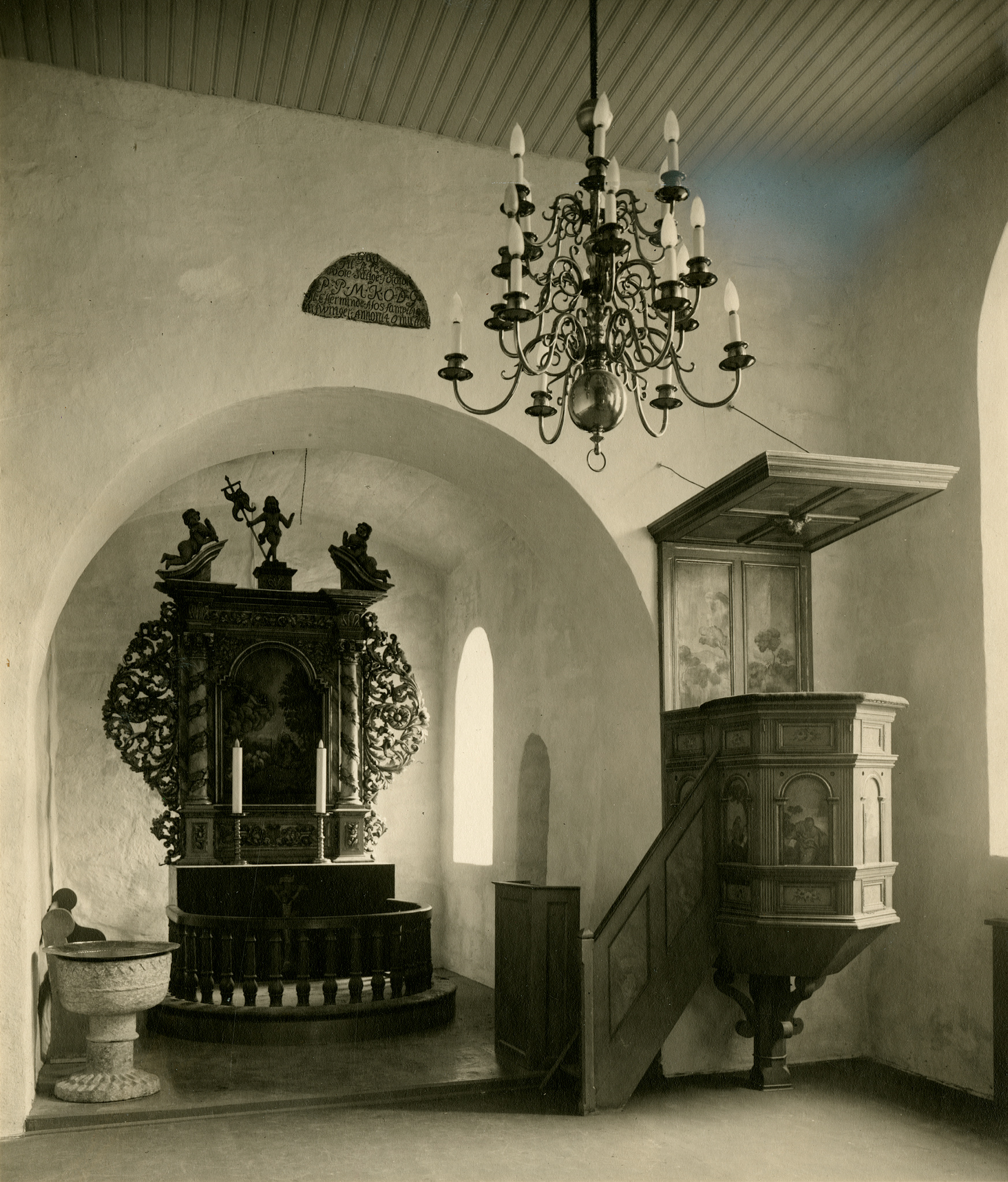 Interiør i Nesodden kirke. Fra Kulturminnebilder.